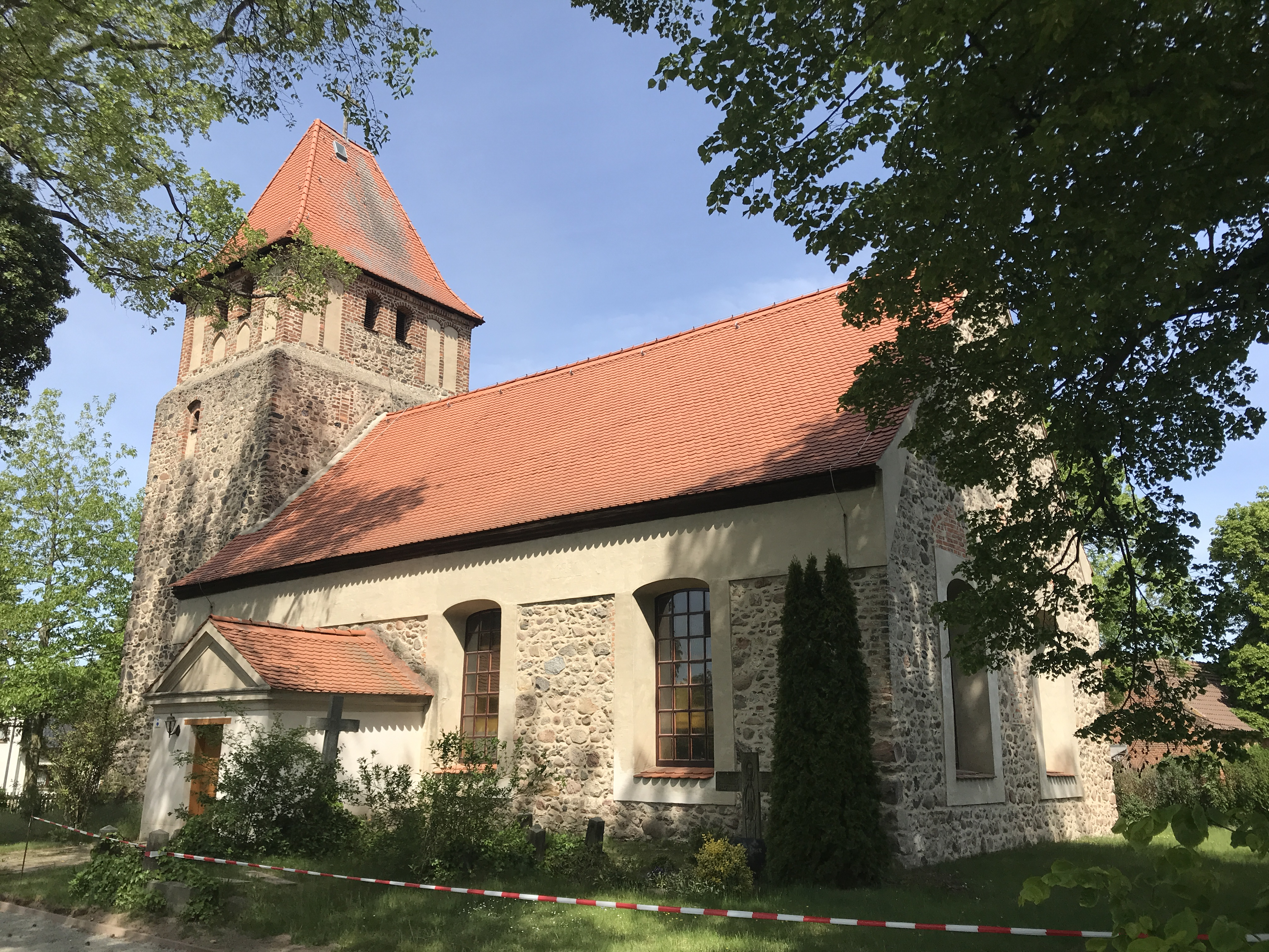 Die Dorfkirche Krugau ist eine Feldsteinkirche aus dem 15. Jahrhundert in der Gemeinde Märkische Heide im Landkreis Dahme-Spreewald in Brandenburg. Im Innern steht unter anderem ein Kanzelaltar aus dem Anfang des 18. Jahrhundert.